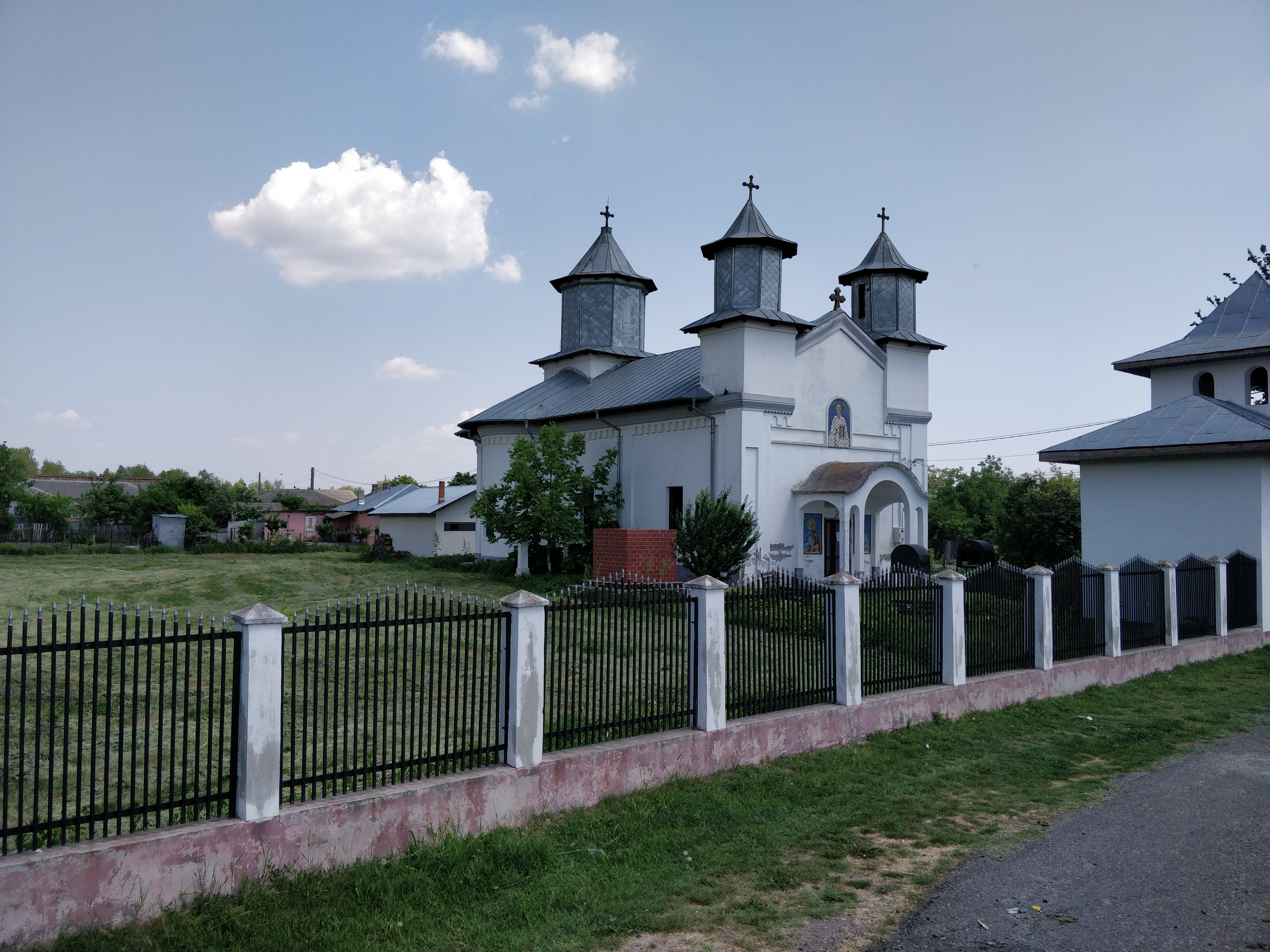 Biserica „Sf. Nicolae”